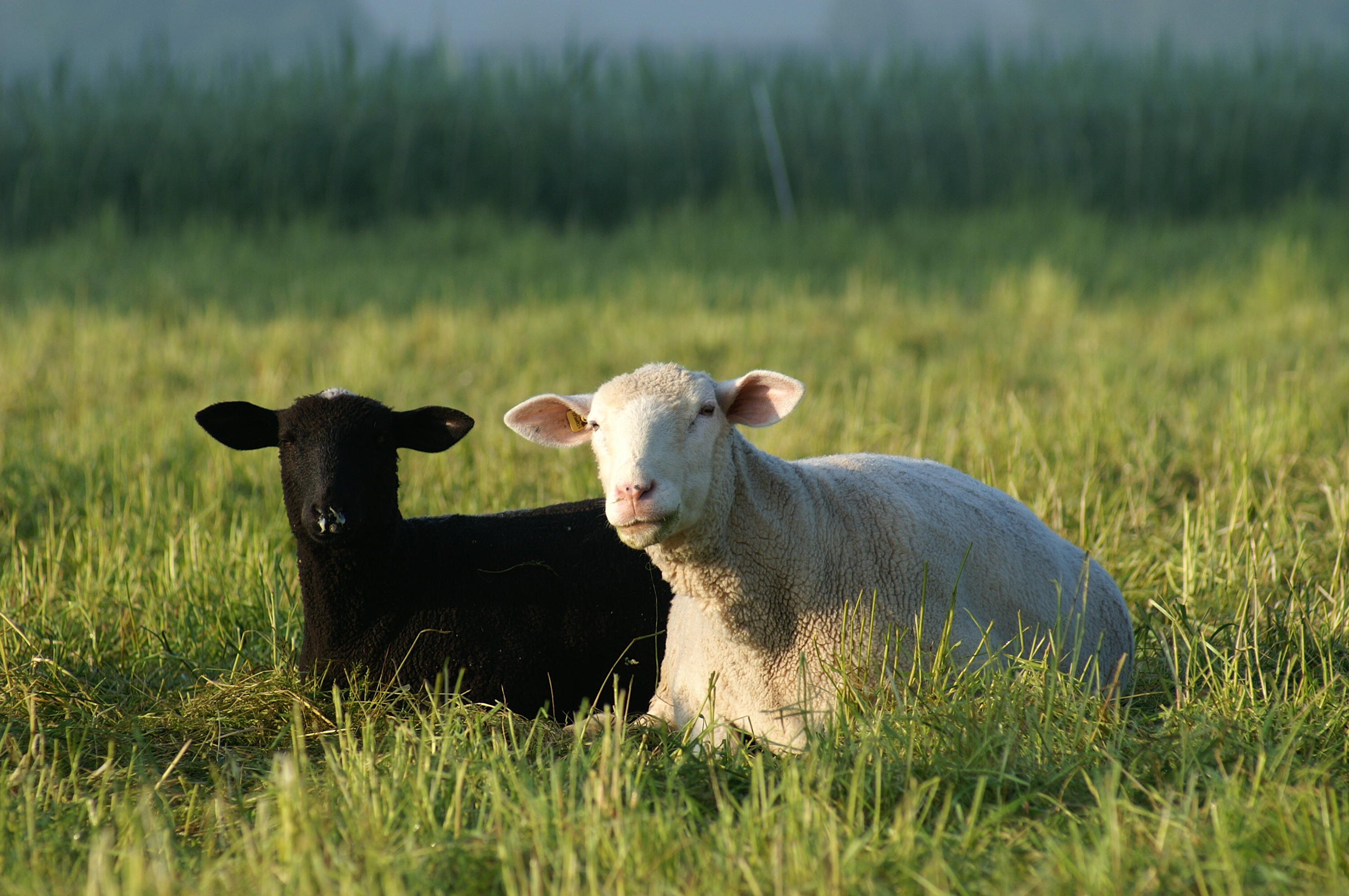 Schafe im Lustenauer Ried.